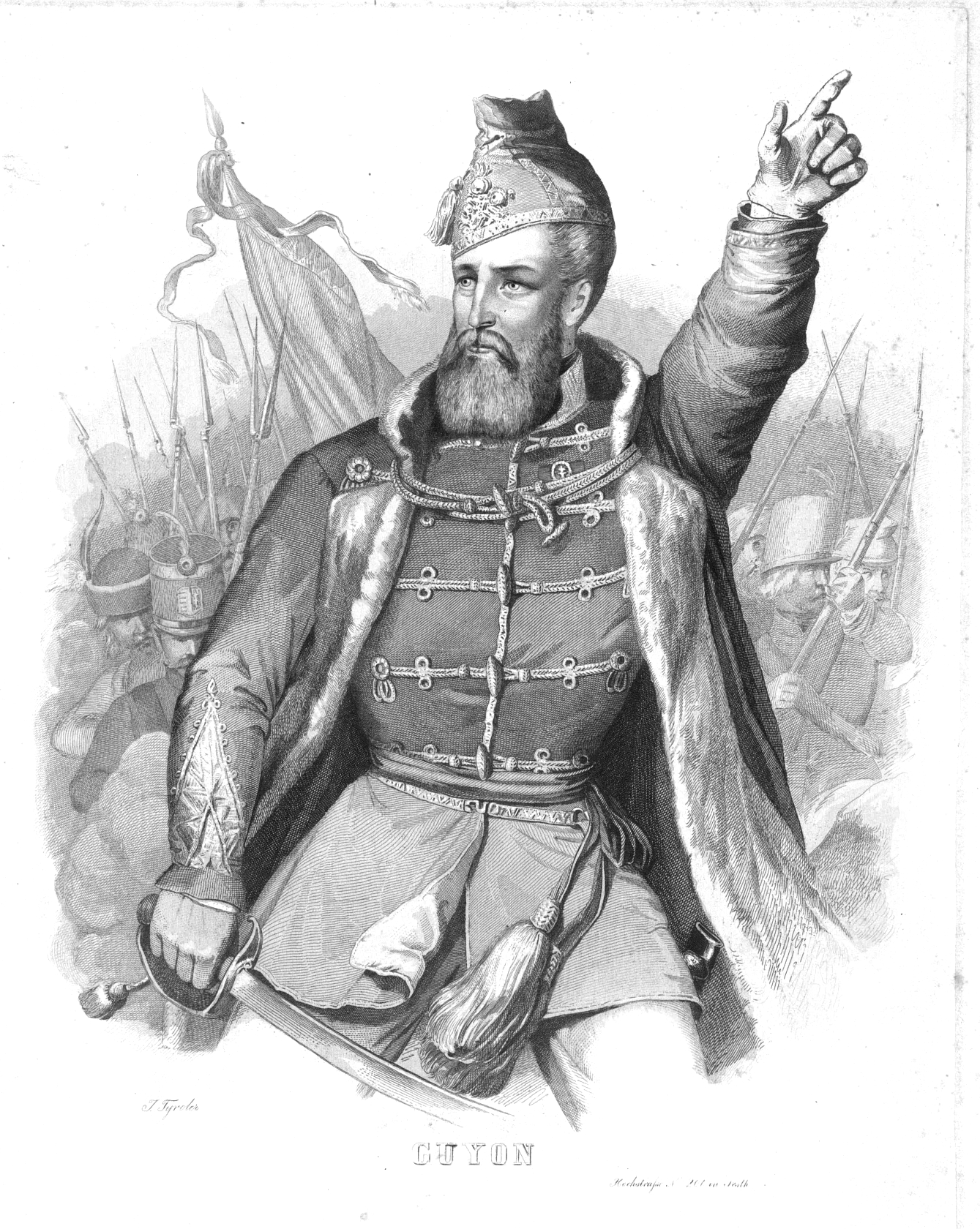 Gróf Guyon-Debaufre Richárd (Bath, 1813. március 31. – Konstantinápoly, 1856. október 11.) az 1848-49-es szabadságharcban a magyar honvédség tábornoka, rövid ideig vezérkari főnök és a honvédség főparancsnoka.